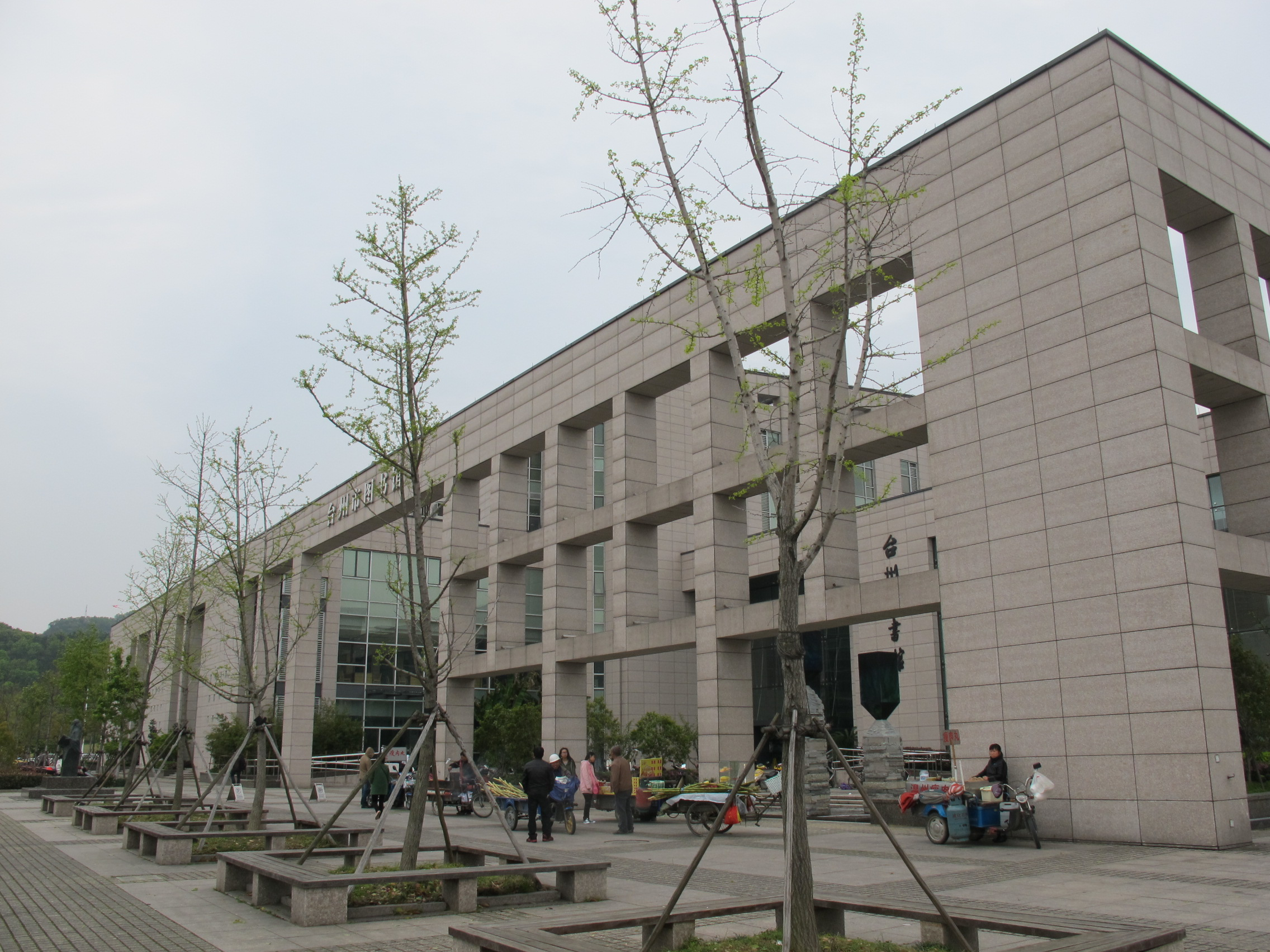 台州市图书馆